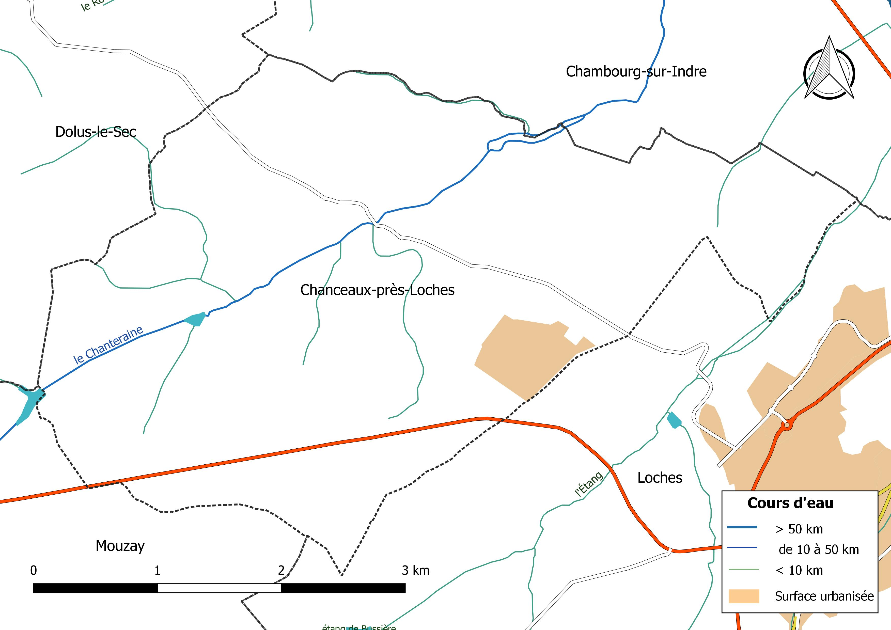 Carte du réseau hydrographique de la commune de Chanceaux-près-Loches (France).